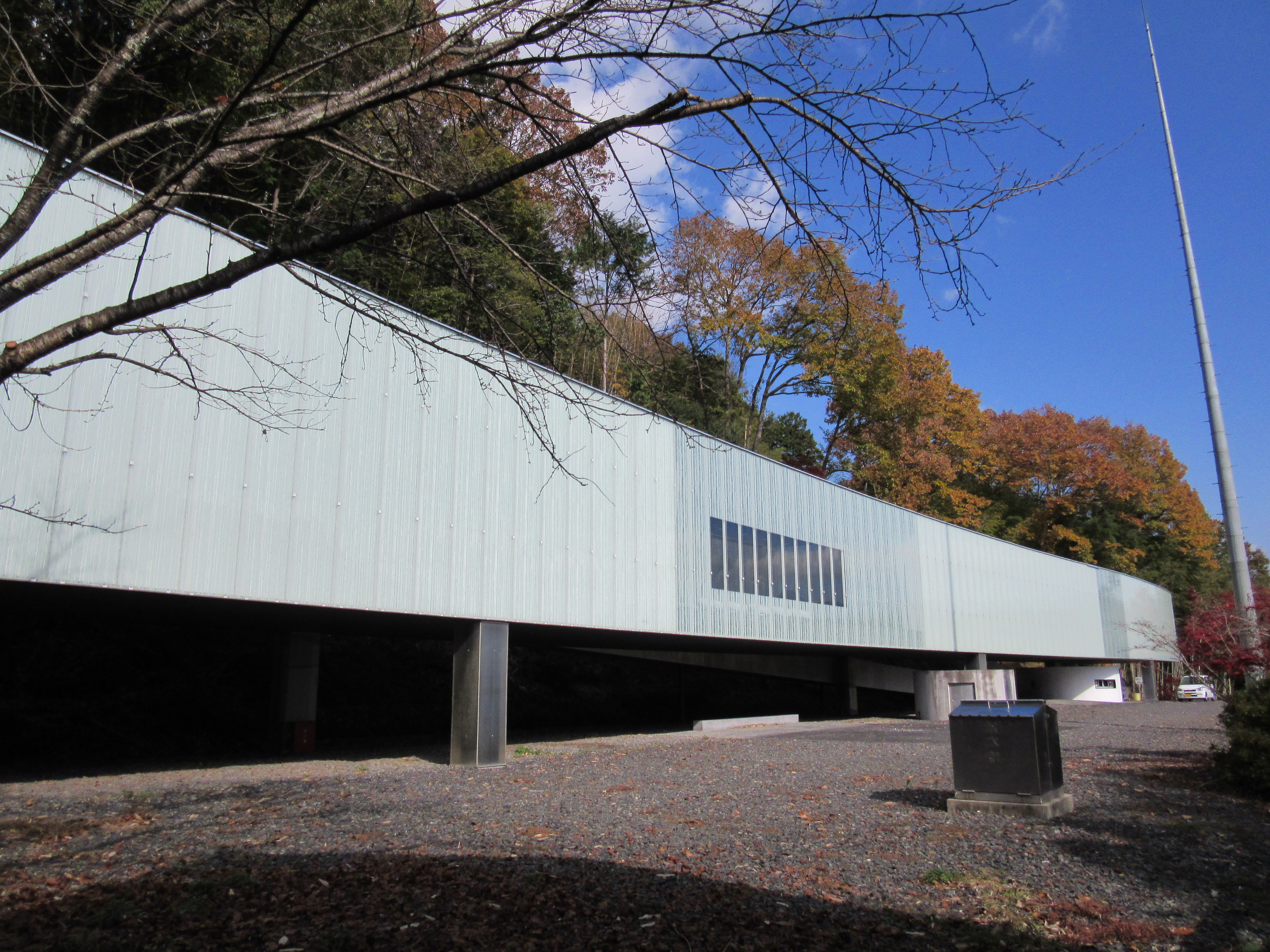 小笠原家資料館